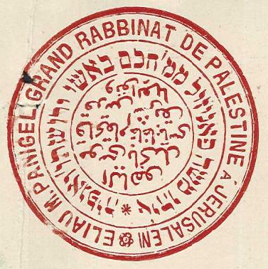 אליהו משה פאניזיל ממ' חכם באשי ירושת"ו ואגפיה. חותם רשמי